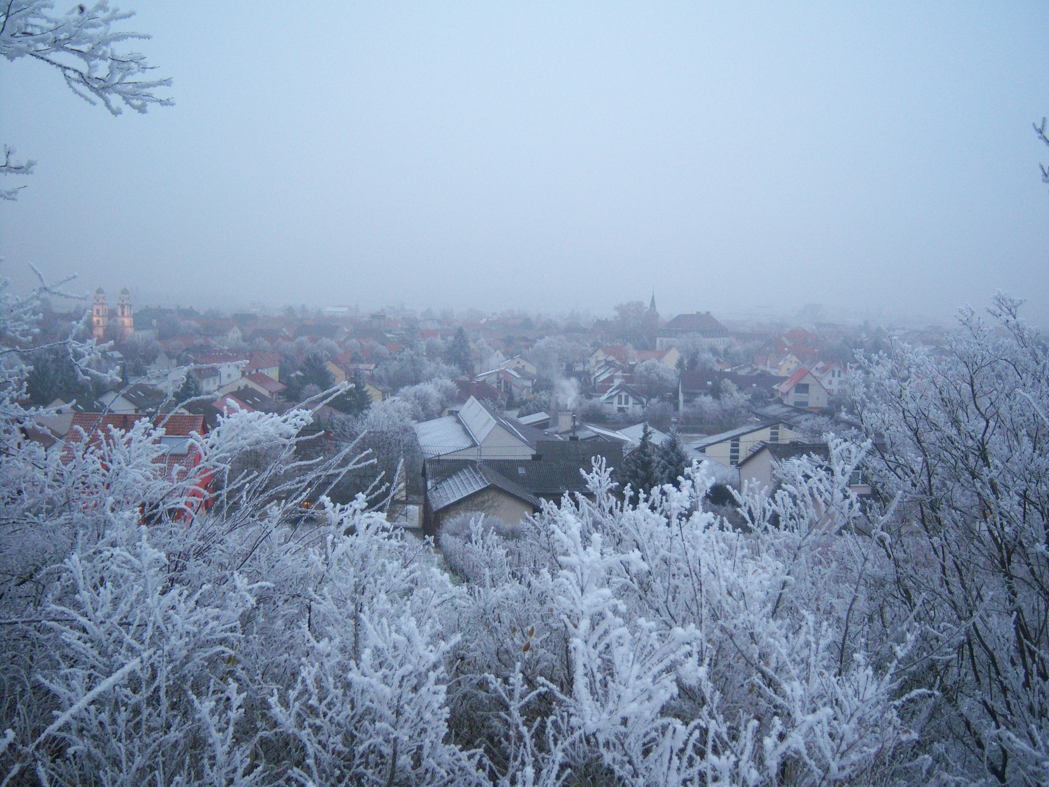 Blick auf Guntersblum von den westlichen Weinbergen aus (am 23.12.2007). Besondere Gebäude zu sehen: Evangelische Kirche (links), Rathaus mit katholischer Kirche (rechts)